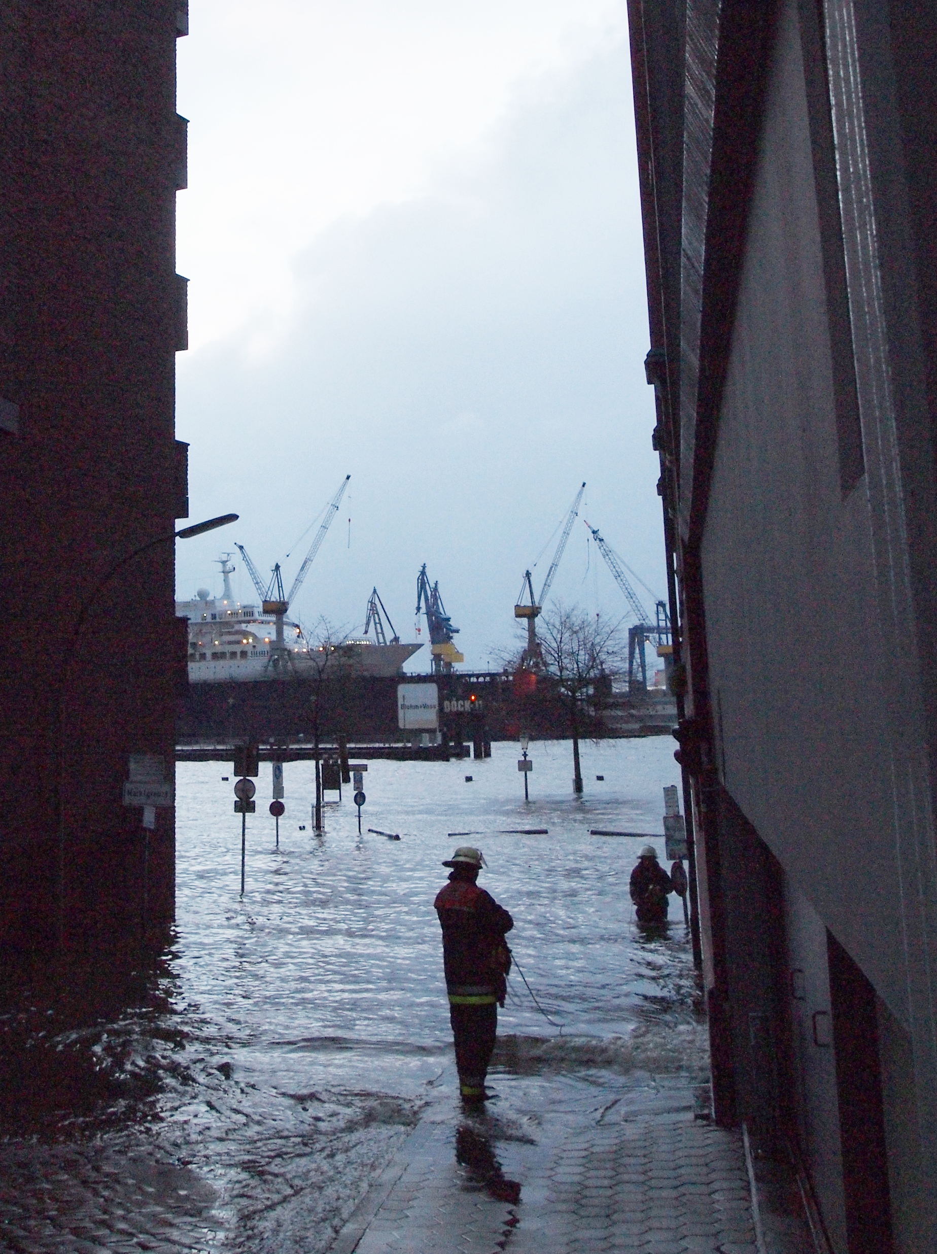 nach der sturmflut an der elbstraße, altona, (2 stunden nach dem scheitelpunkt) hier bei pegelstand st. pauli ca. 10 meter bzw. 700 cm über seekarten null; feuerwehrmänner bereiten das abpumpen der vollgelaufenen keller vor